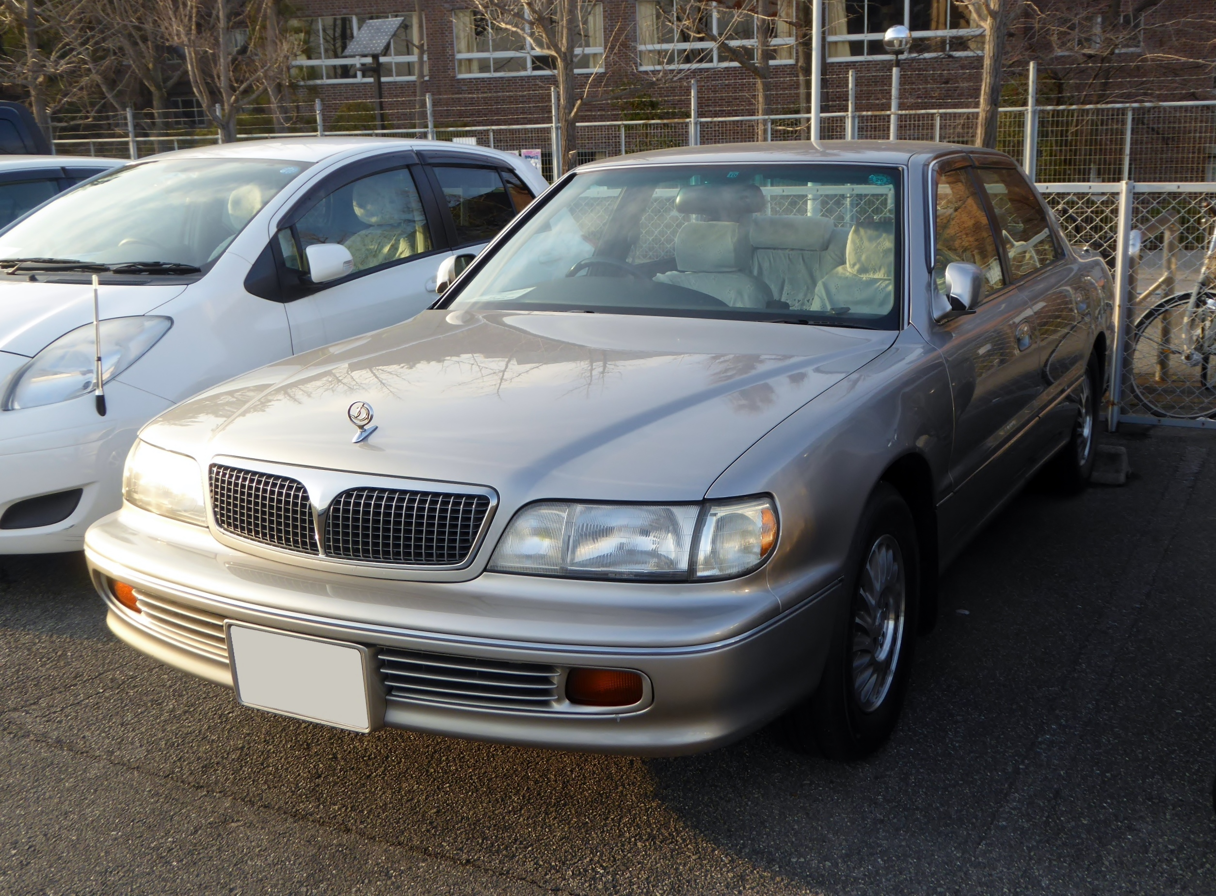 S22A型三菱・デボネアエグゼクティブIをフロントから撮影。